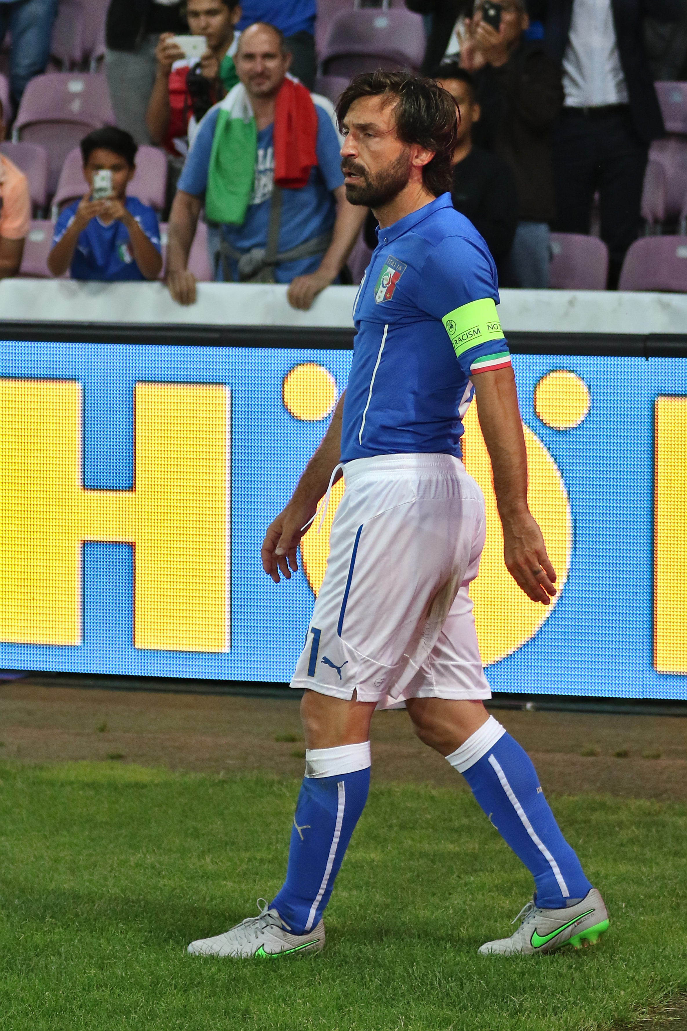 20150616 - Portugal - Italie - Genève - Andra Pirlo